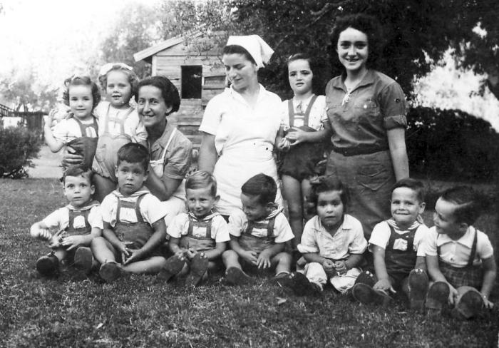 גן שמואל-המטפלות צילי עדה ניר ורות קרונפלד עם ילדי קבוצת נשר